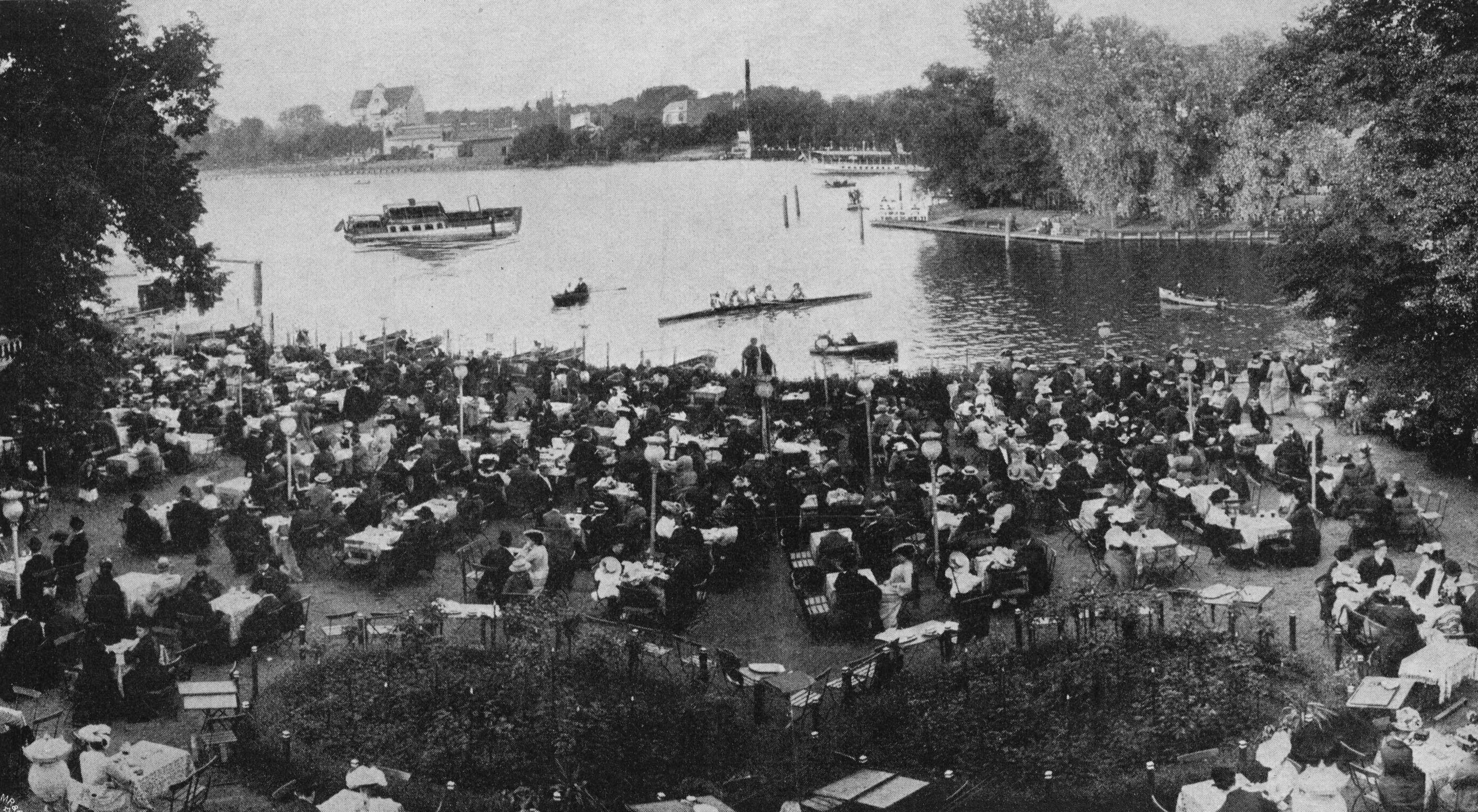 Restaurant Zenner in Berlin-Treptow